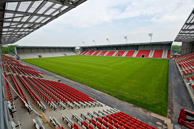 Leigh Sport Stadium